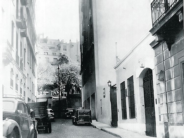 Vista del Pasaje Seaver, desaparecido callejón de Buenos Aires, hacia la década de 1950.